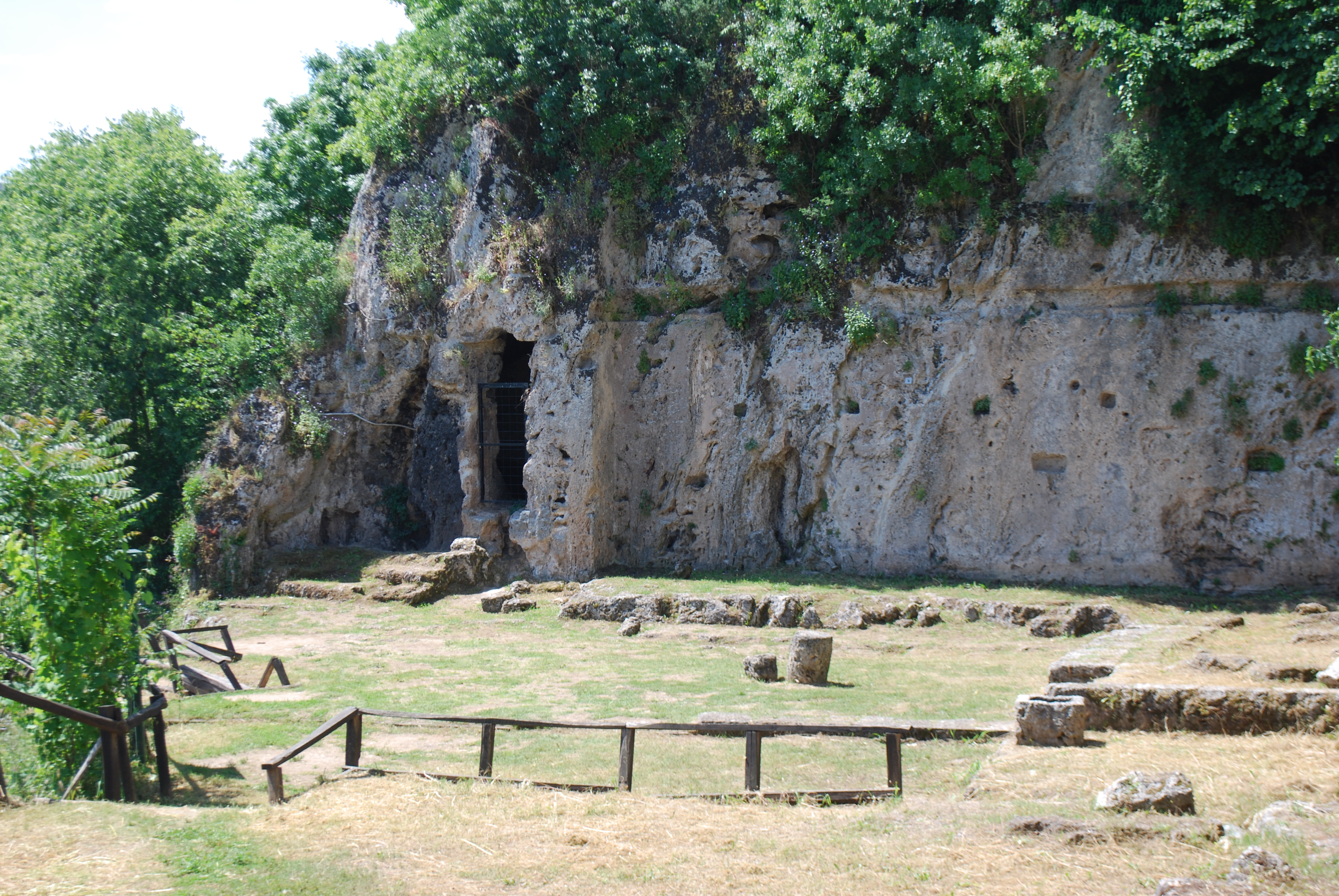 Vue des ruines de l'école où Aristote enseigna à Alexandre, sur le site de l'ancienne Mieza, en Macédoine.